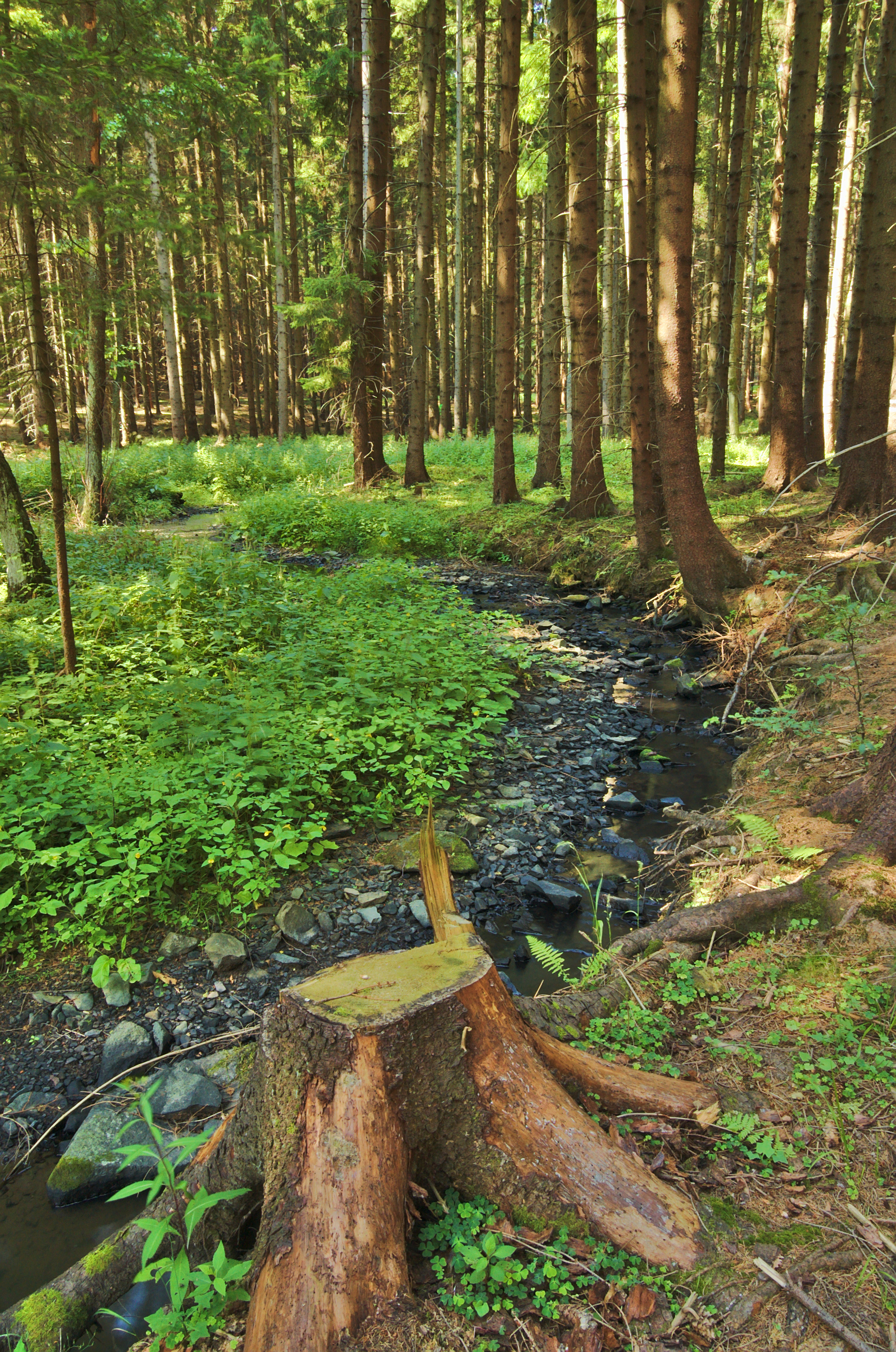 Potok Luha, okres Blansko